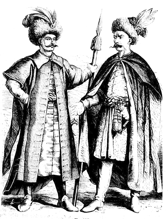 Polski szlachcic i rotmistrz